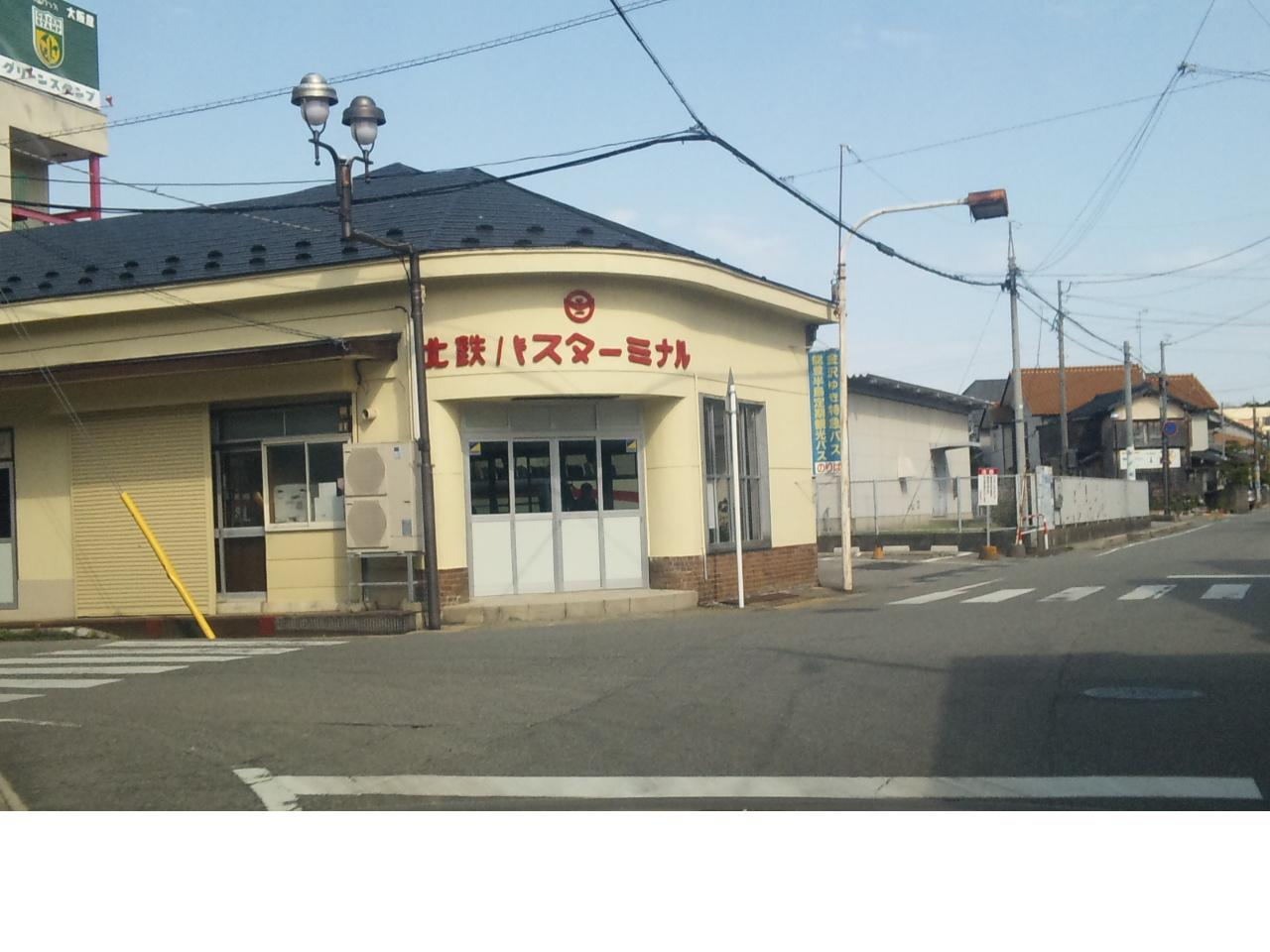 北鉄和倉バスターミナル